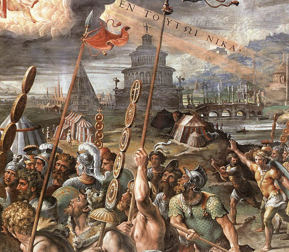 detail